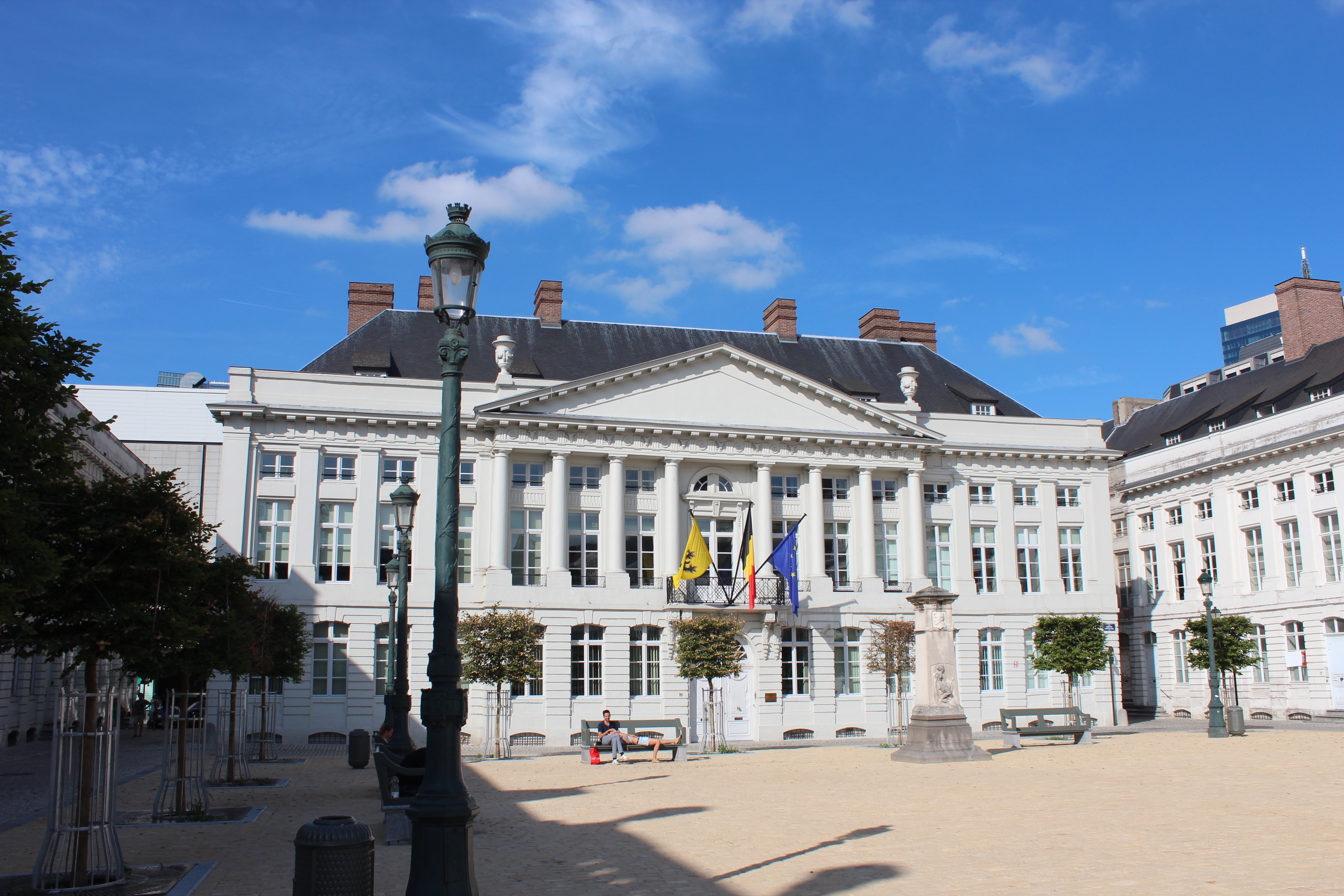 Place des Martyrs; Construit en 1774-1776 par CLAUDE FISCO, Style: Néoclassique PLACE DES MARTYRS 1 - 23 BRUXELLES Classé comme Monument: Immeubles de la place des Martyrs ainsi que le Monument aux Martyrs Protection définitive: 10/06/1963